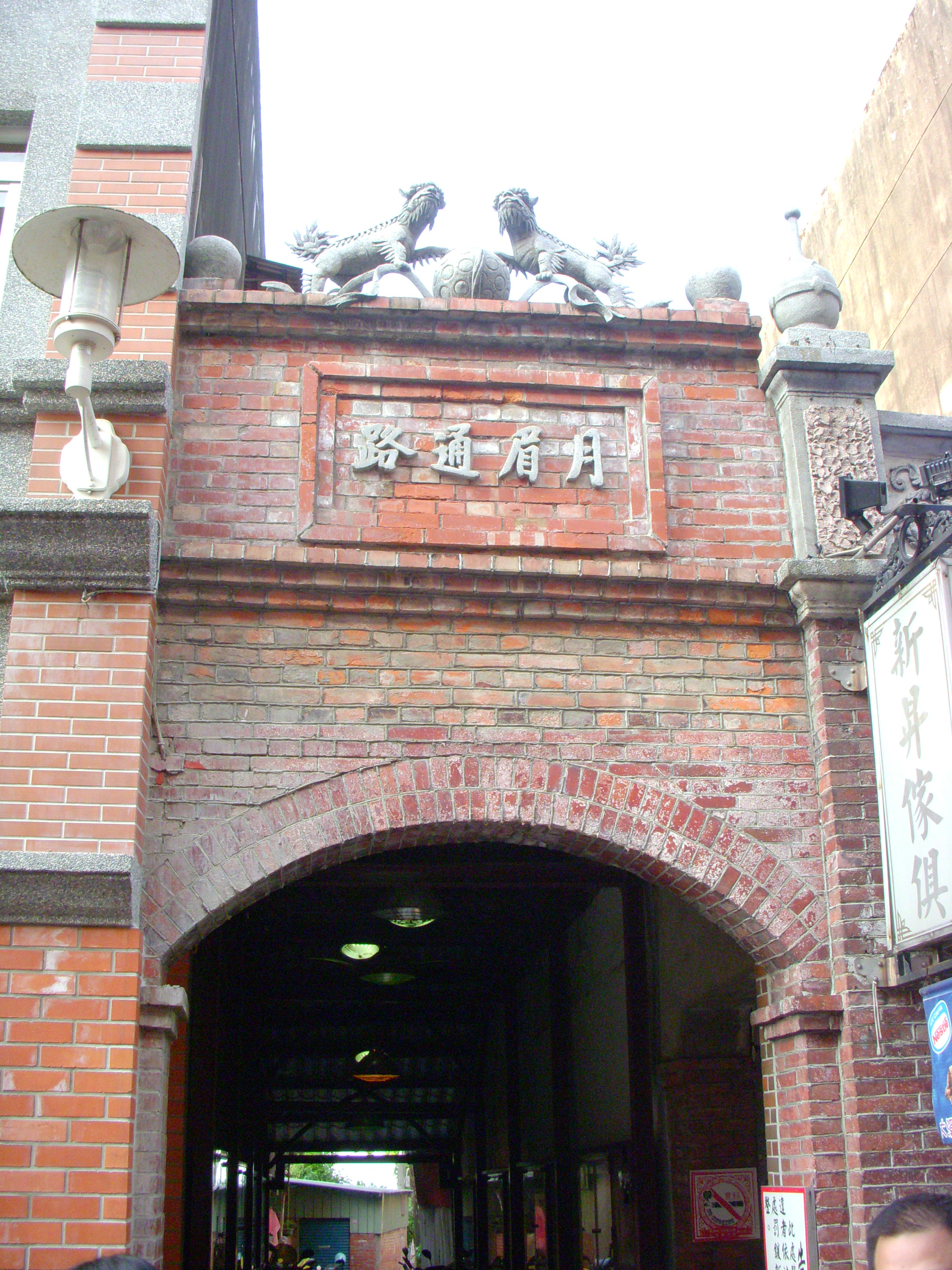 大溪老街月眉通路